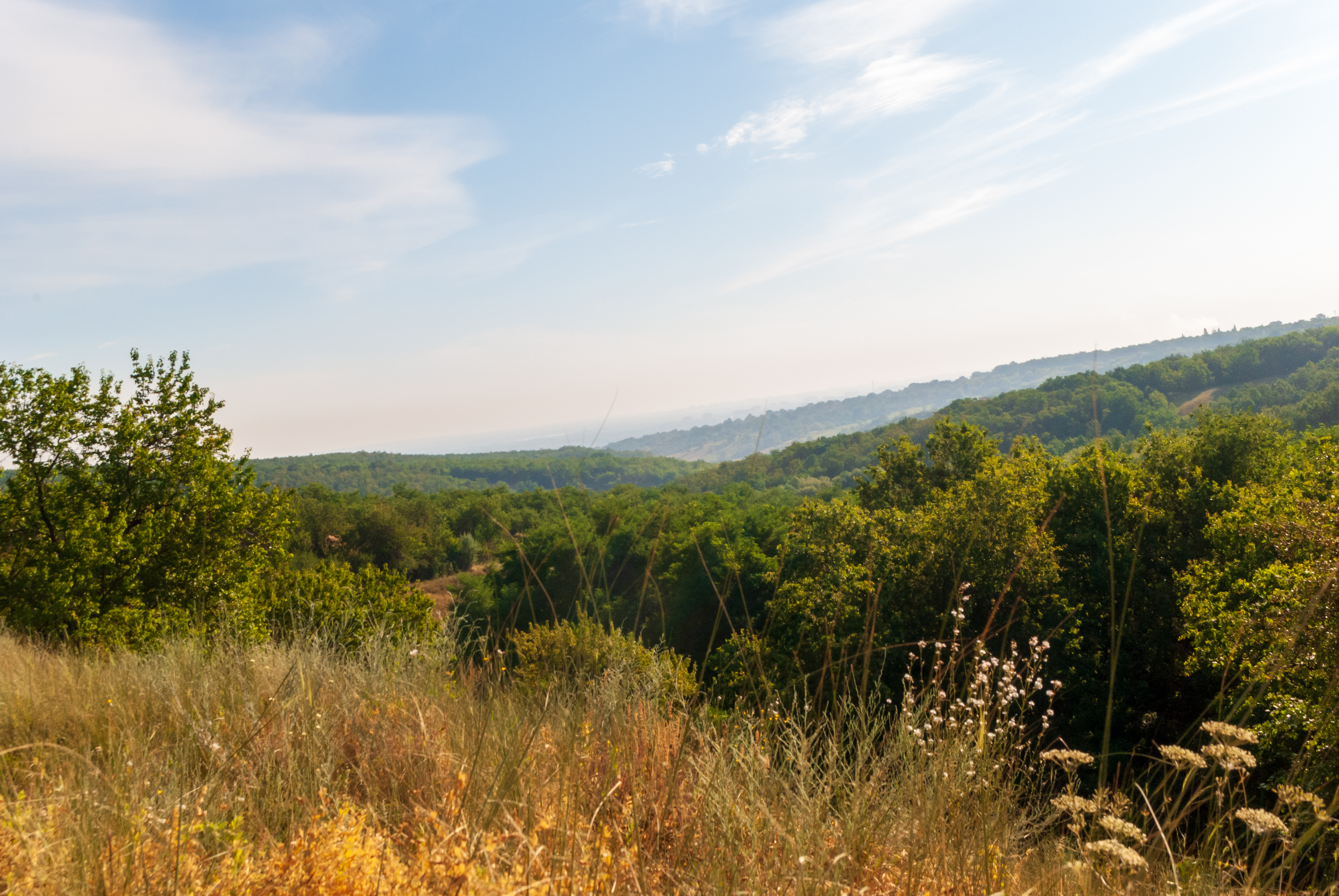 Ділянка дубових насаджень, м. Дніпропетровськ, у північній частині с. Таромське Ленінського району, Ленінське лісництво кв. 33, діл. 6